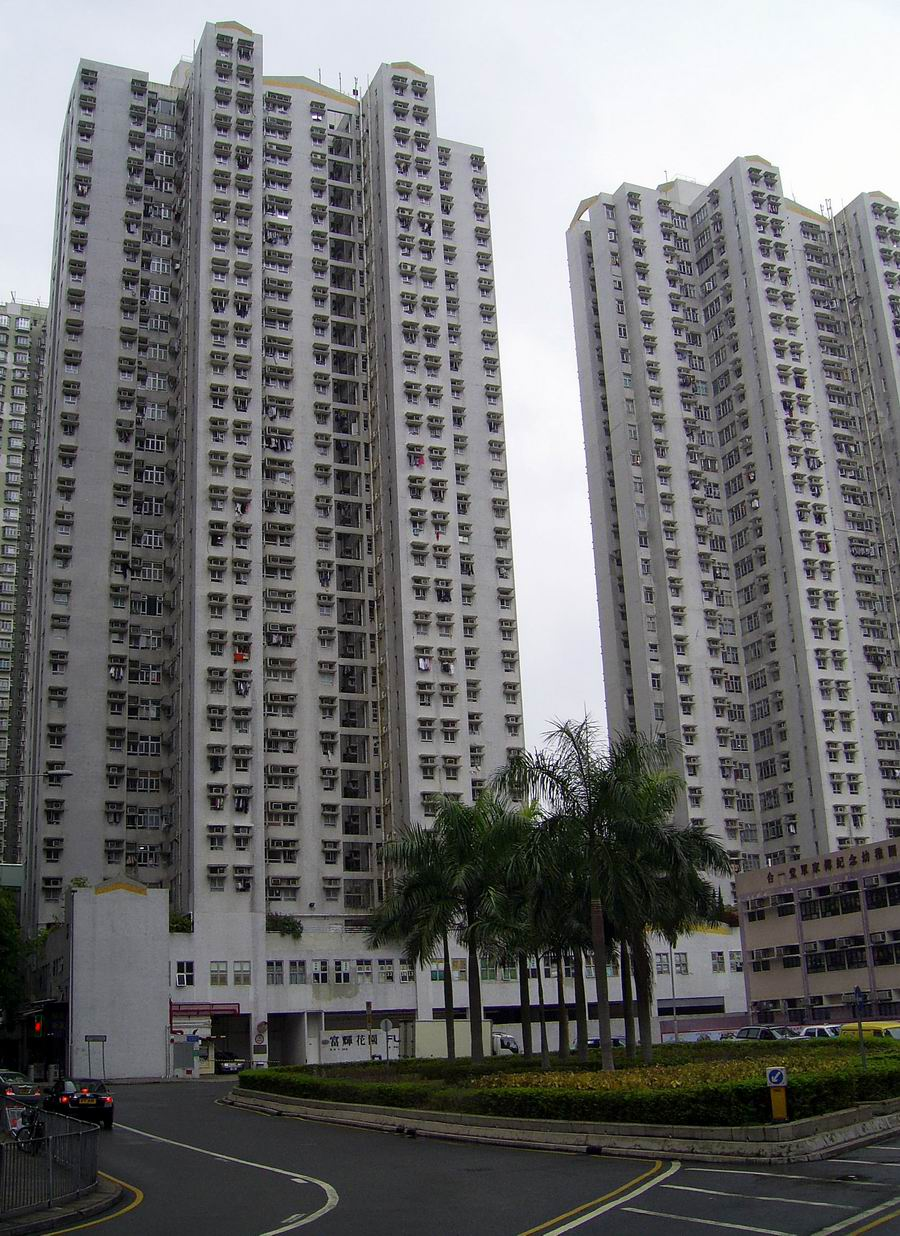 富輝花園